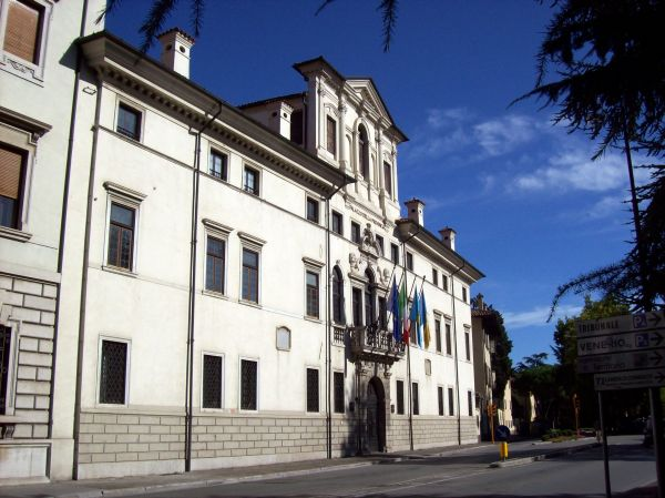 Udine (Friuli-Venezia Giulia-Italy), Palazzo Antonini Belgrado sede della Provincia